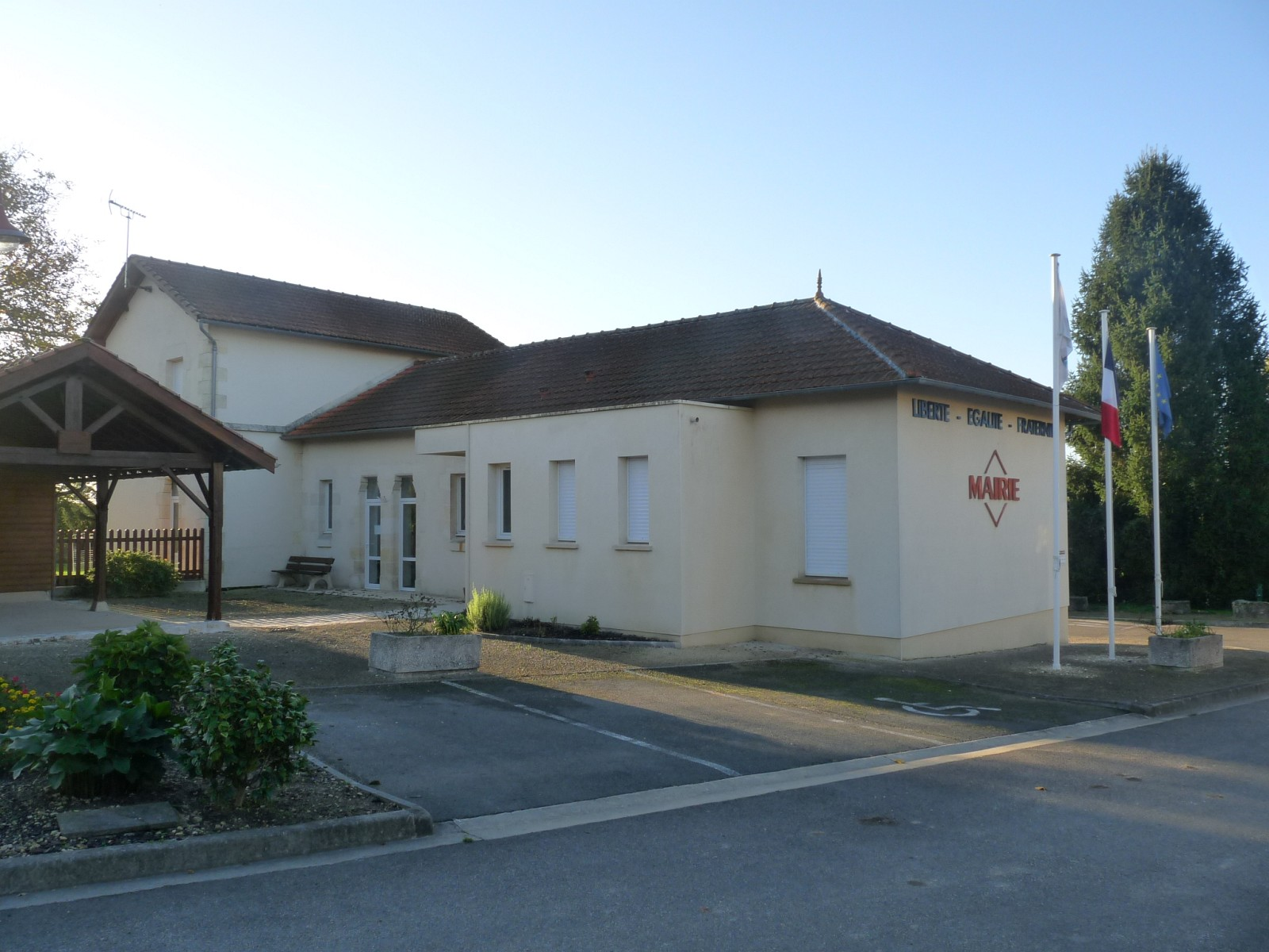 Mairie de Jussas, Charente-Maritime, France